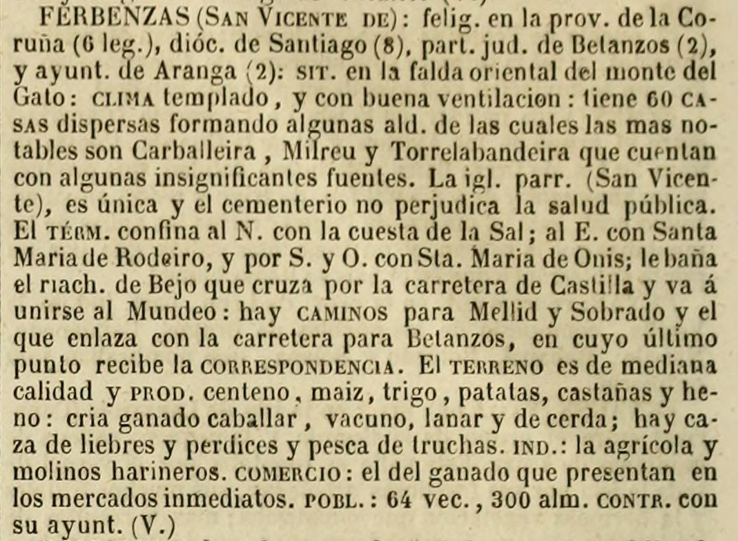 Fervenzas no Diccionario geográfico-estadístico-histórico de España y sus posesiones de Ultramar.